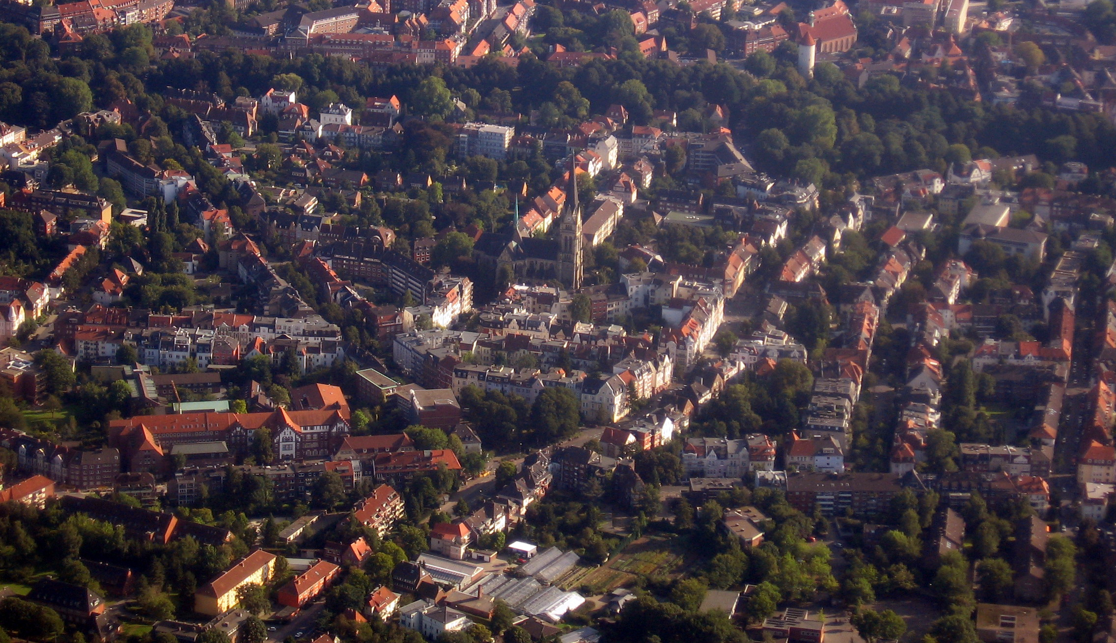 Luftbildaufnahme des Kreuzviertels von Münster (Westfalen), von Norden aus nach Süden fotografiert. In der Mitte die Heilig-Kreuz-Kirche, im Hintergrund Promenade und Buddenturm, im Vordergrund links das Johannisstift-Krankenhaus, recht daneben der Nordplatz.